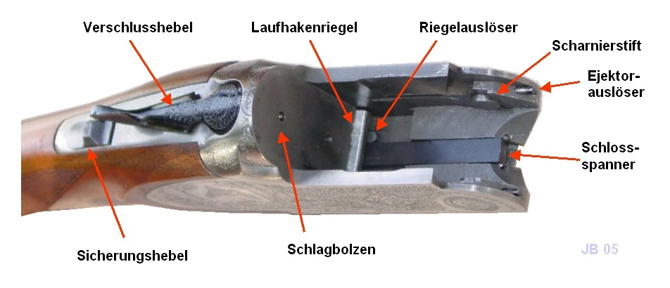 Basküle einer Bockdoppelflinte mit Erläuterungen